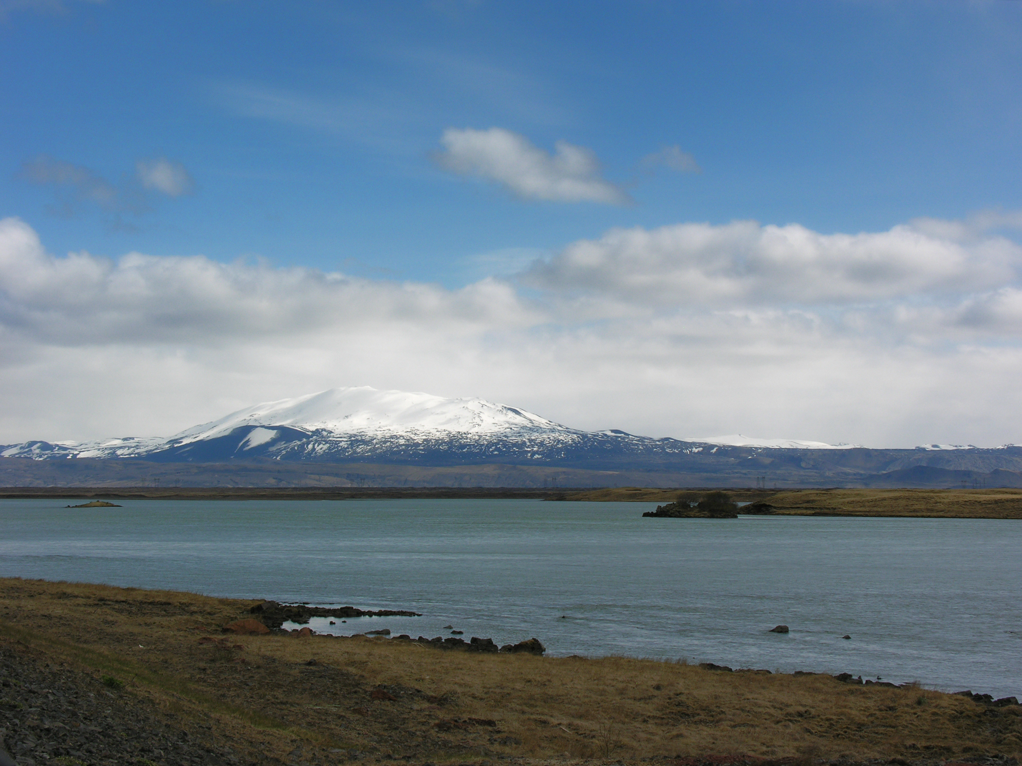 Iceland, Þjórsá and Hekla